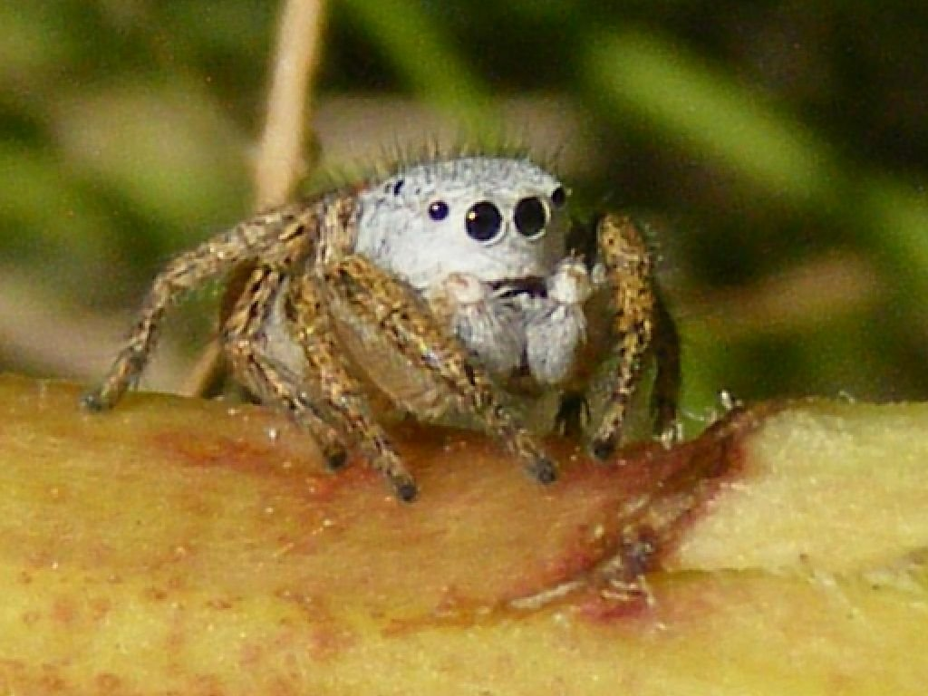 Habronattus decorus : Photographié dans la région montréalaise les 10 août 2010 et 4 juin 2011, sur Fujifilm FinePix S700.